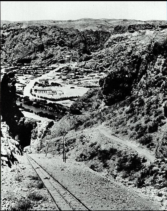 Funicular en el tiempo de la construcción del dique Florentino Ameghino. El ramal provisorio de trocha 75cm desde la línea principal del FCCC acercaba por la meseta detrás del fotógrafo. Está detrás el cabo rocoso a la derecha el embalse mismo. Se conjetura que el funicular era de trocha 60cm y asociado con las operaciones de Grun y Bilfinger, pero no hay prueba en esta foto porque es posible que sea la trocha de 75cm. La fotografía se halla disponible Centro de Estudios Historicos y Sociales de Puerto Madryn